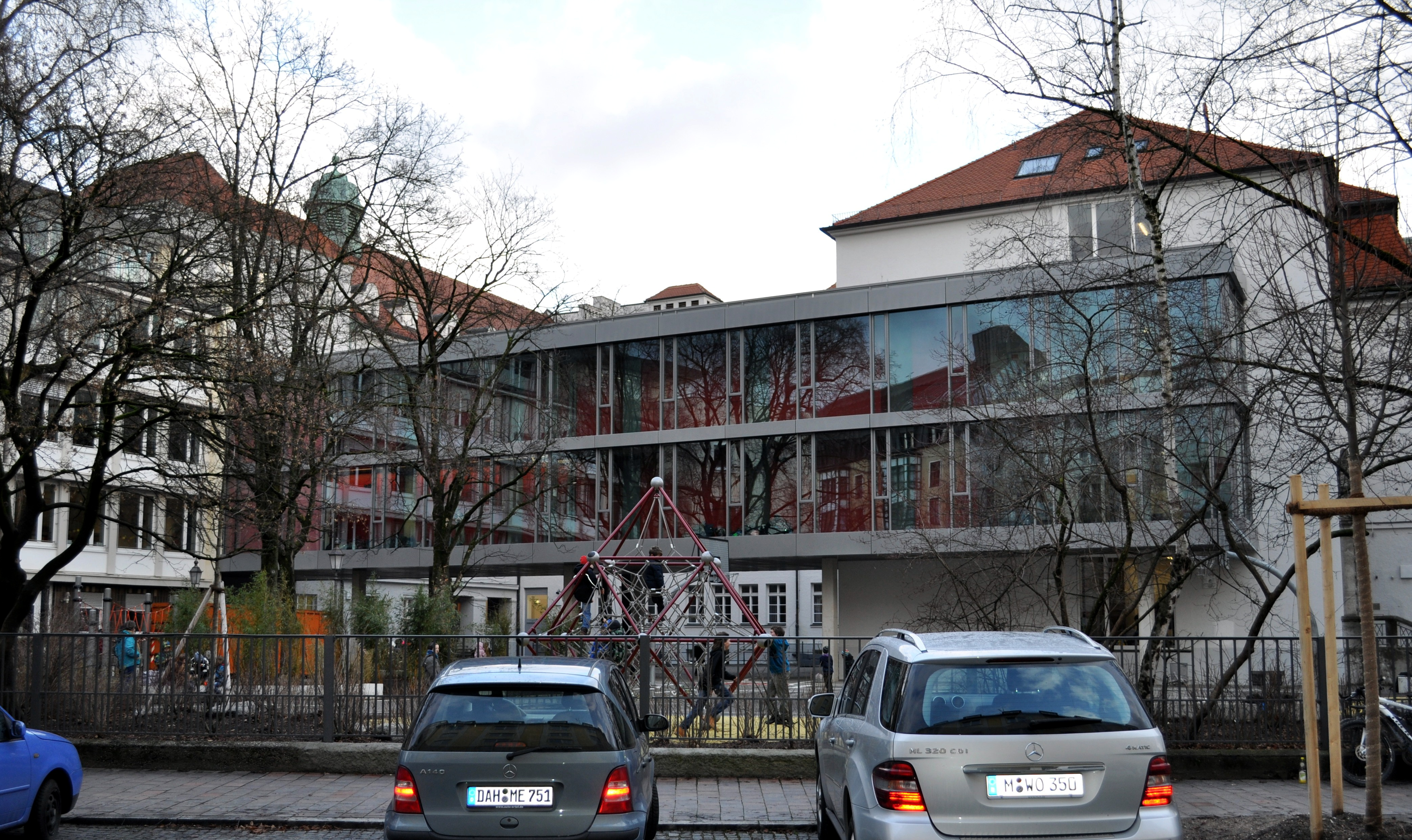 St.-Anna-Grundschule und -Gymnasium; Blick von Westen